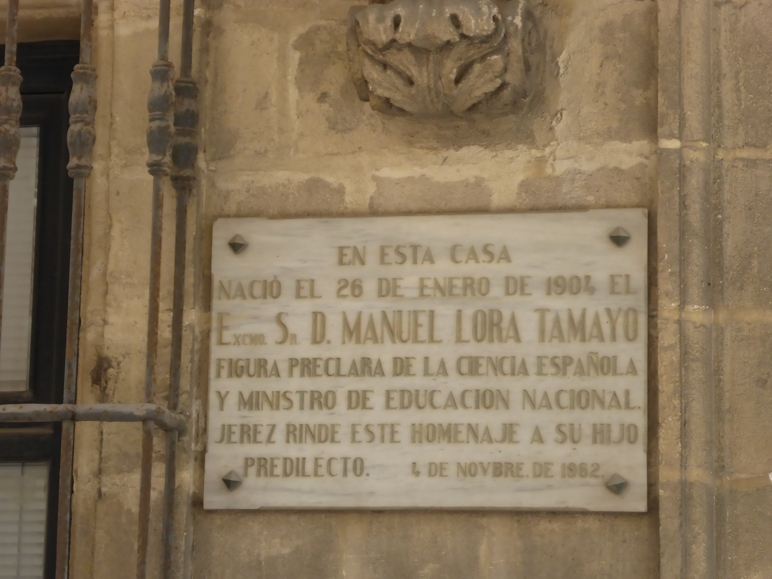 Casa Manuel Lora Tamayo - placa (Jerez de la Frontera, España)